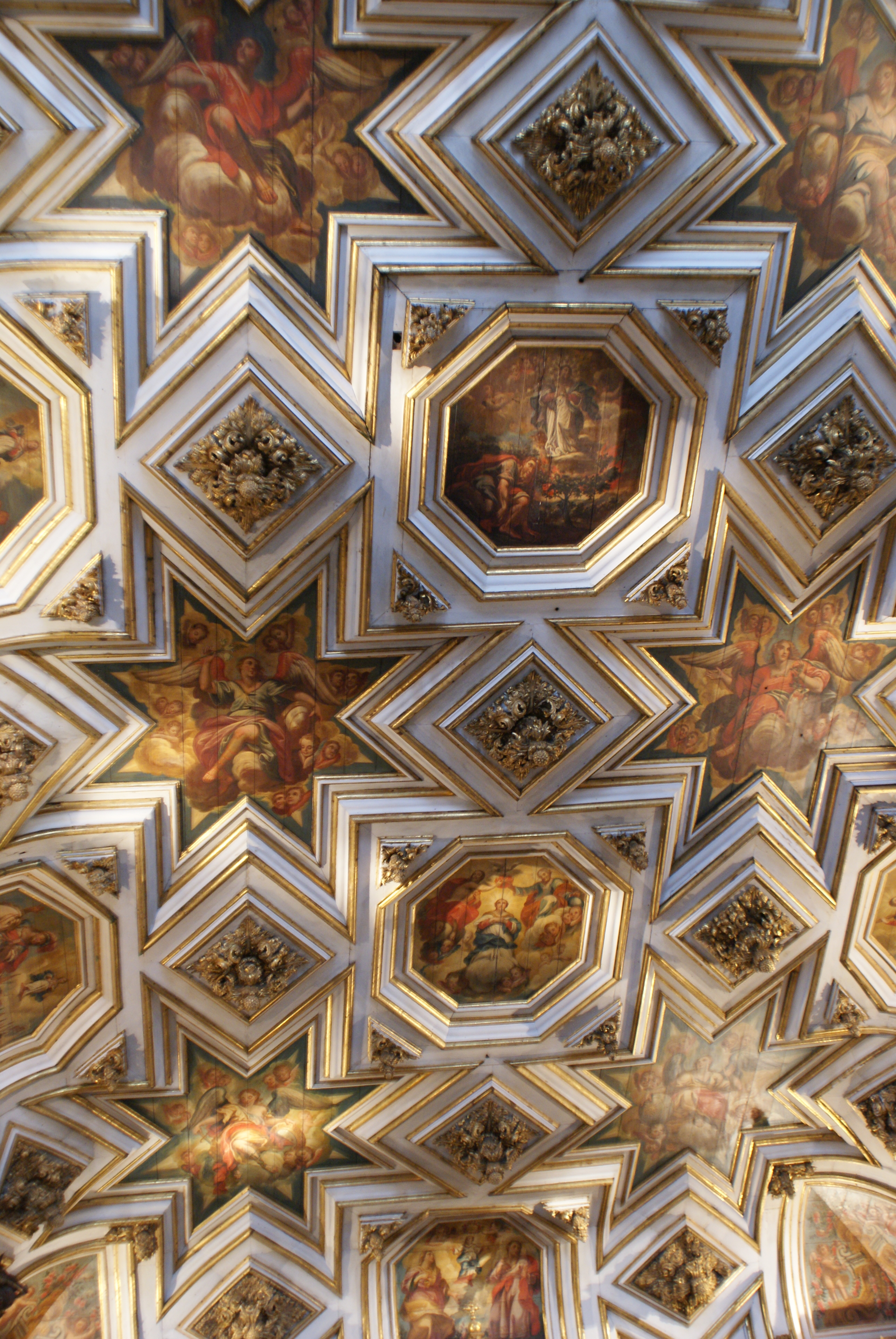 Igreja de São Francisco (Salvador)